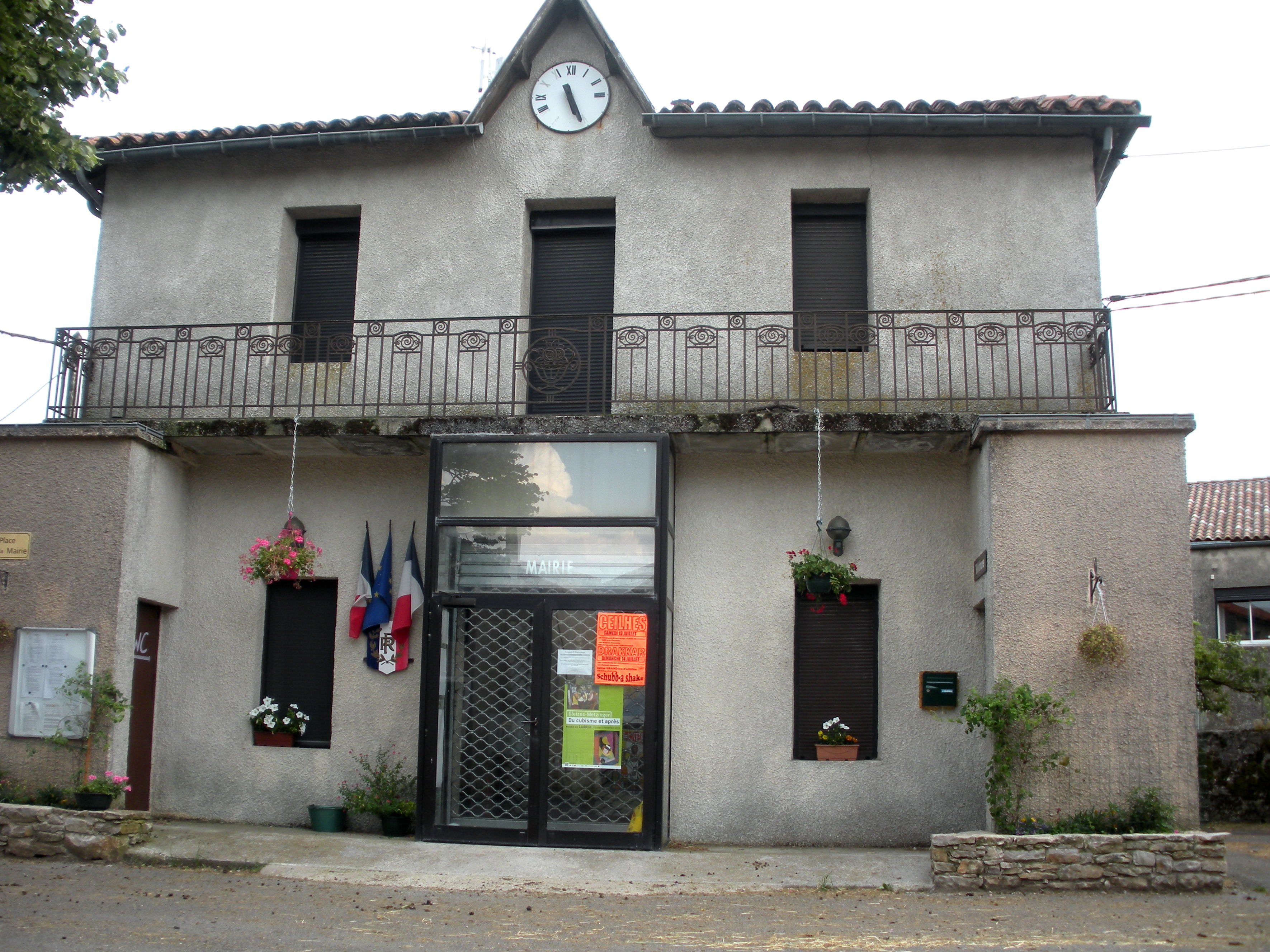 la mairie de roqueredonde